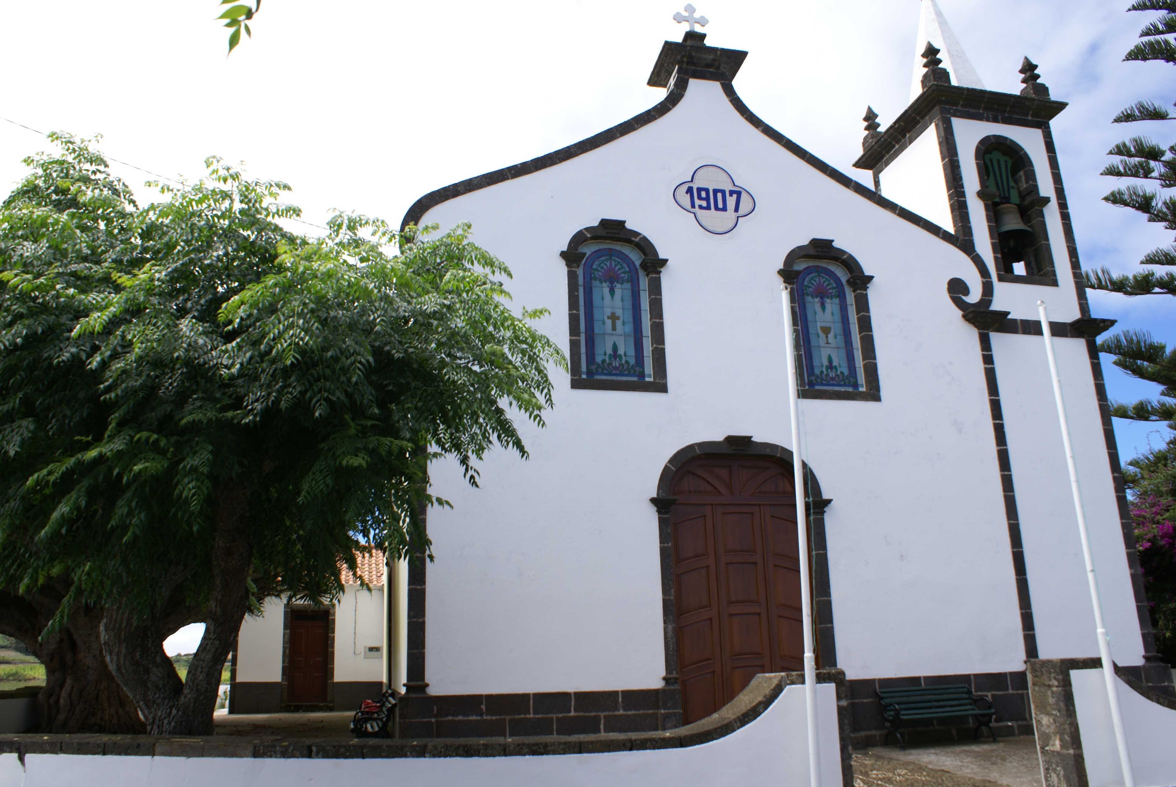 Igreja de Santo António, Vitória, Santa Cruz da Graciosa, ilha Graciosa, Açores, Portugal